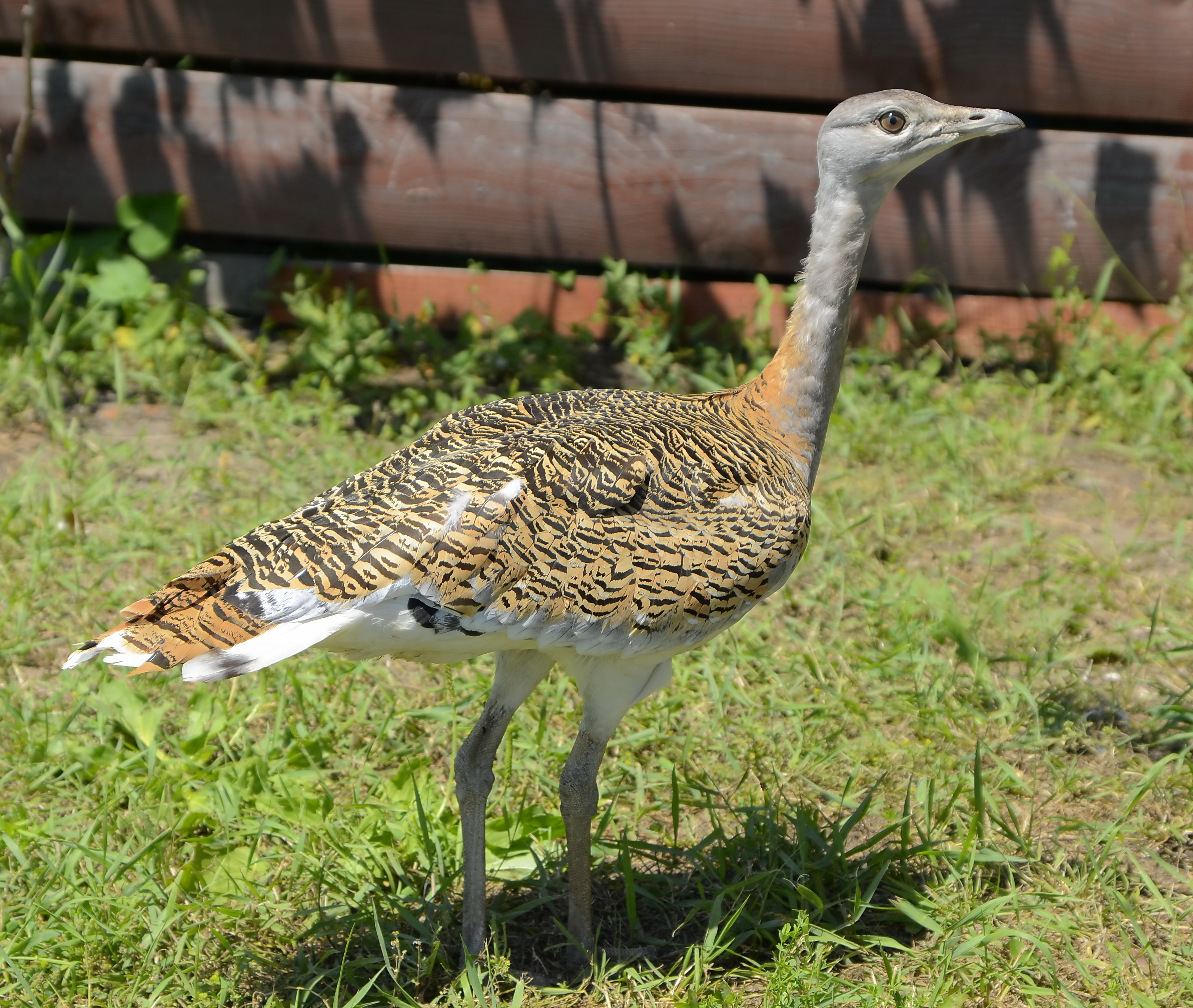 Otis tarda Female